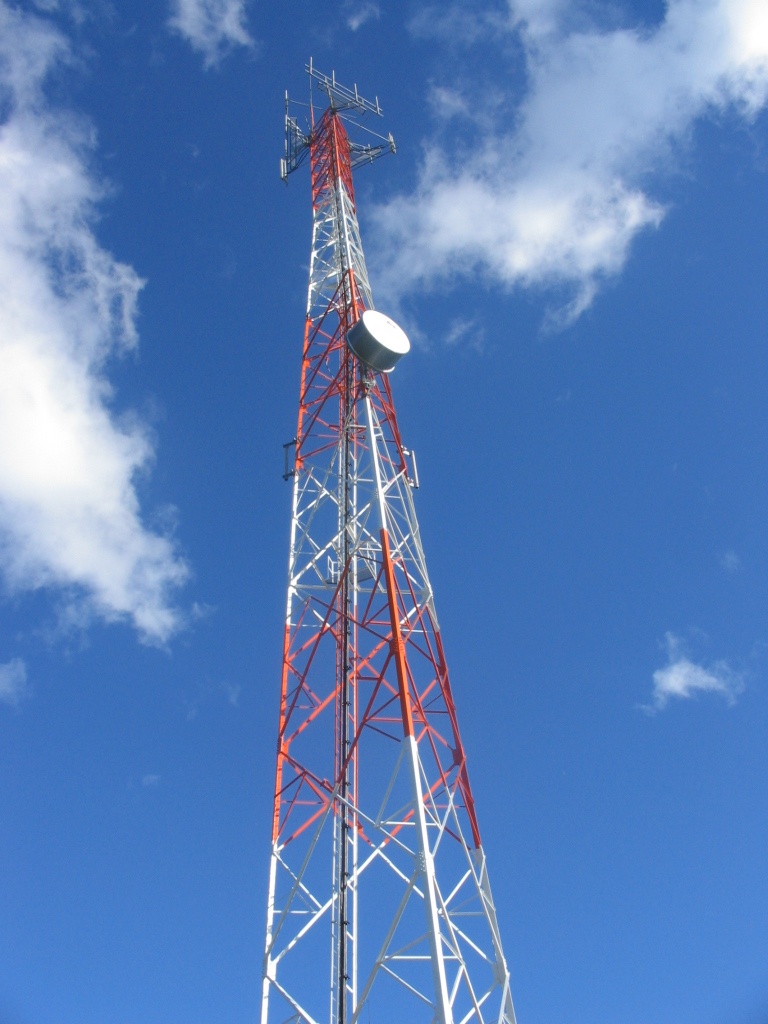 Torre de una Antena de telefonía movil